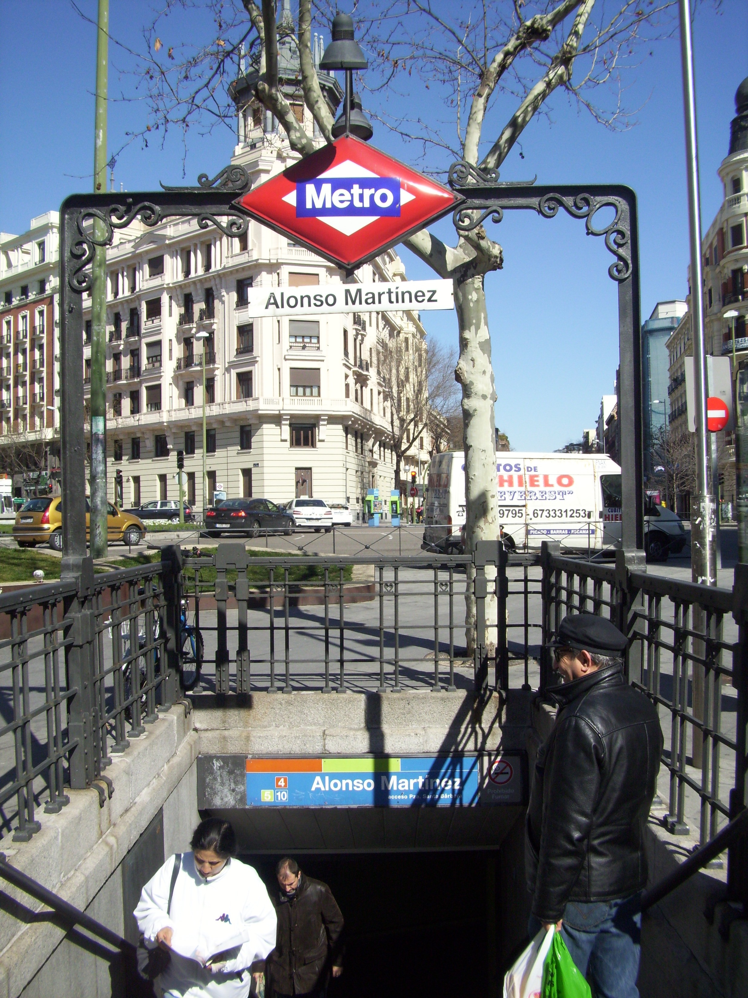 Alonso Martínez (metropolitana di Madrid)